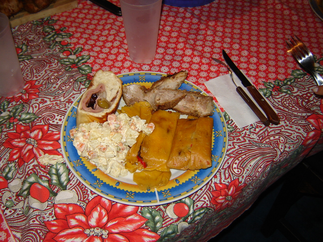 Tipico Plato Navideño Venezolano, Hallaca, Bollo, Pernil, Pan de Jamon y ensalada de Gallina